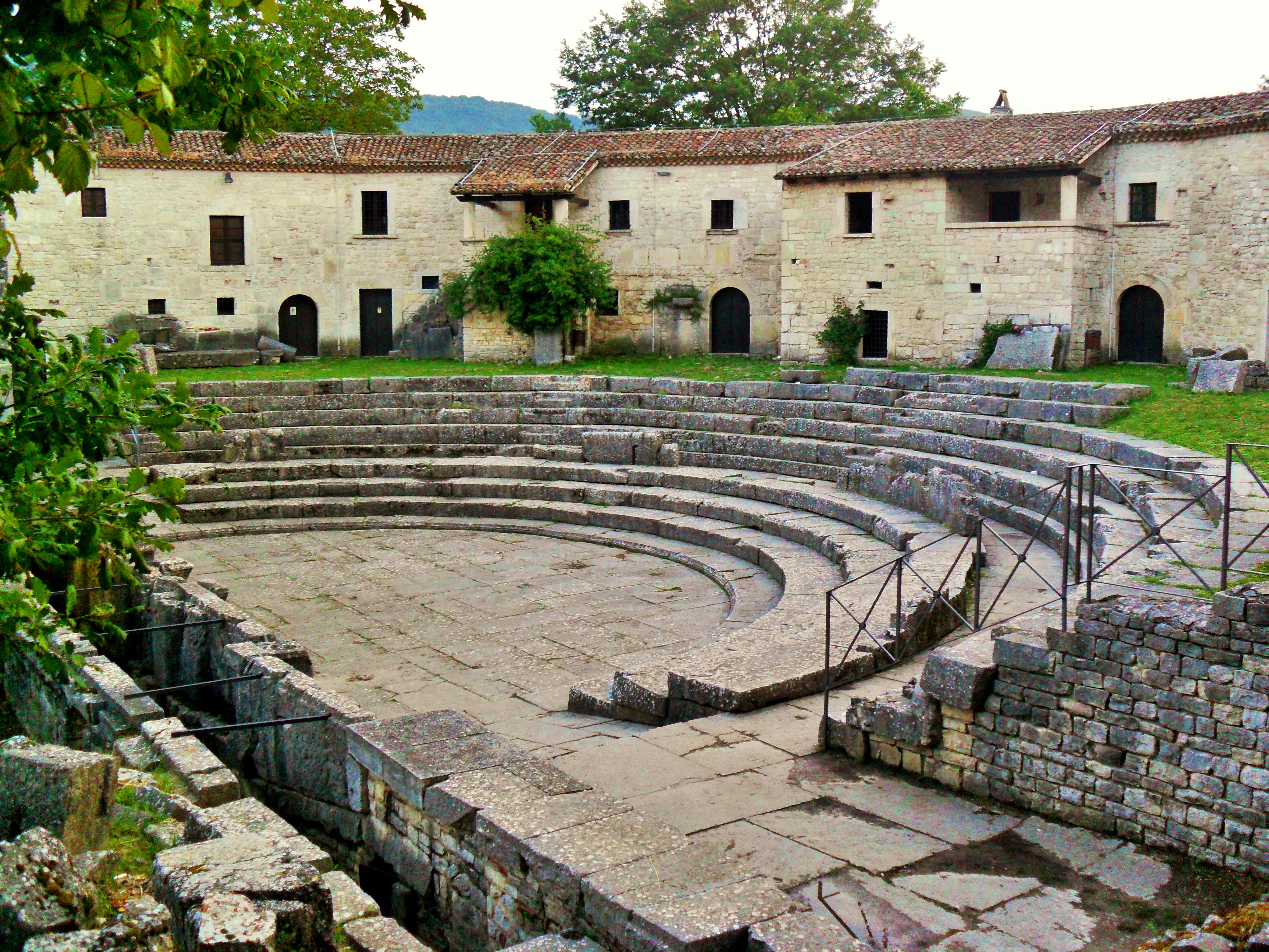 Area archeologica - MIBAC This is a photo of a monument which is part of cultural heritage of Italy.